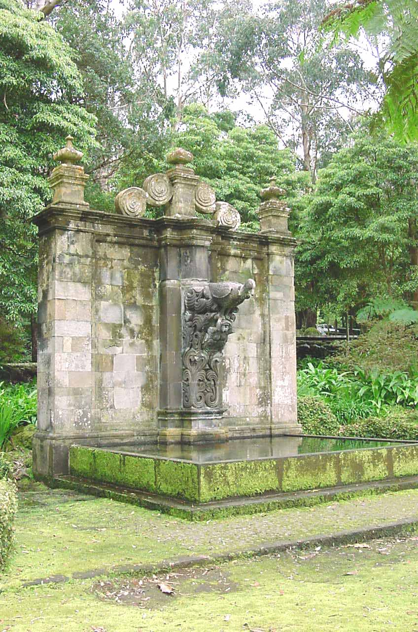 Reserva Florestal de Recreio da Serreta, Serreta, Angra do Heroísmo, Ilha Terceira, Açores: fontanário.